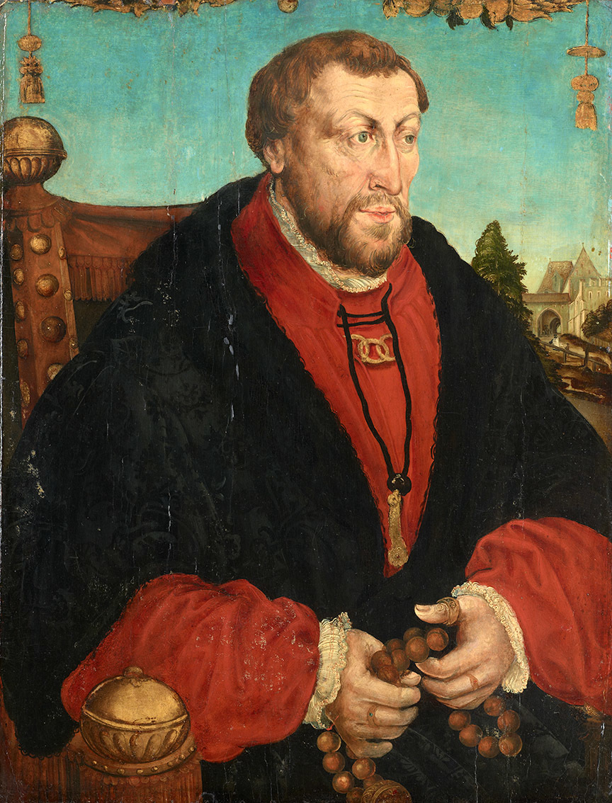 Pfalzgraf Wolfgang (1494-1558) (unsicher)